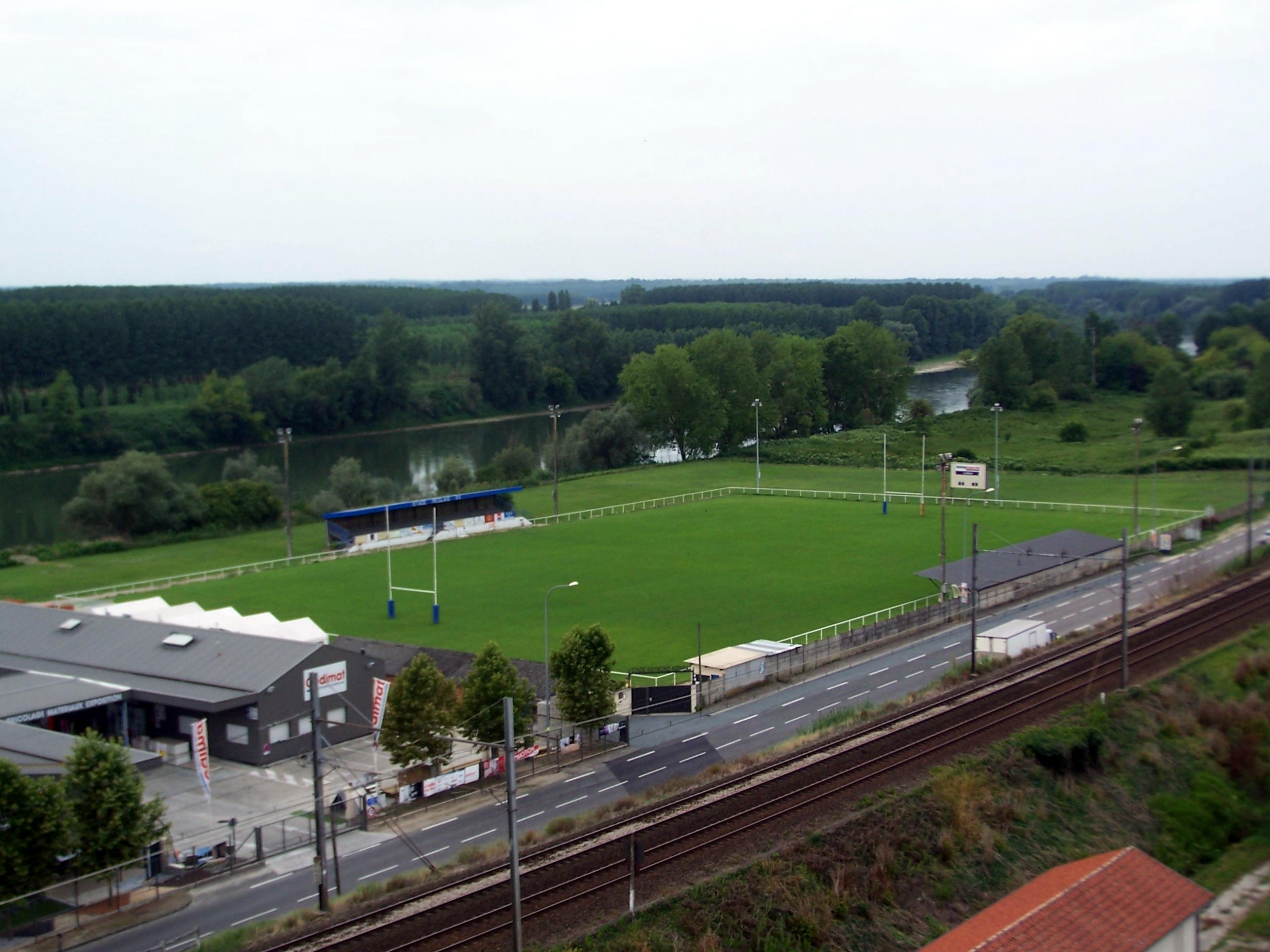 Le stade de rugby à XIII vu depuis la tour sud-ouest du château des Quat'Sos de La Réole, Gironde, France